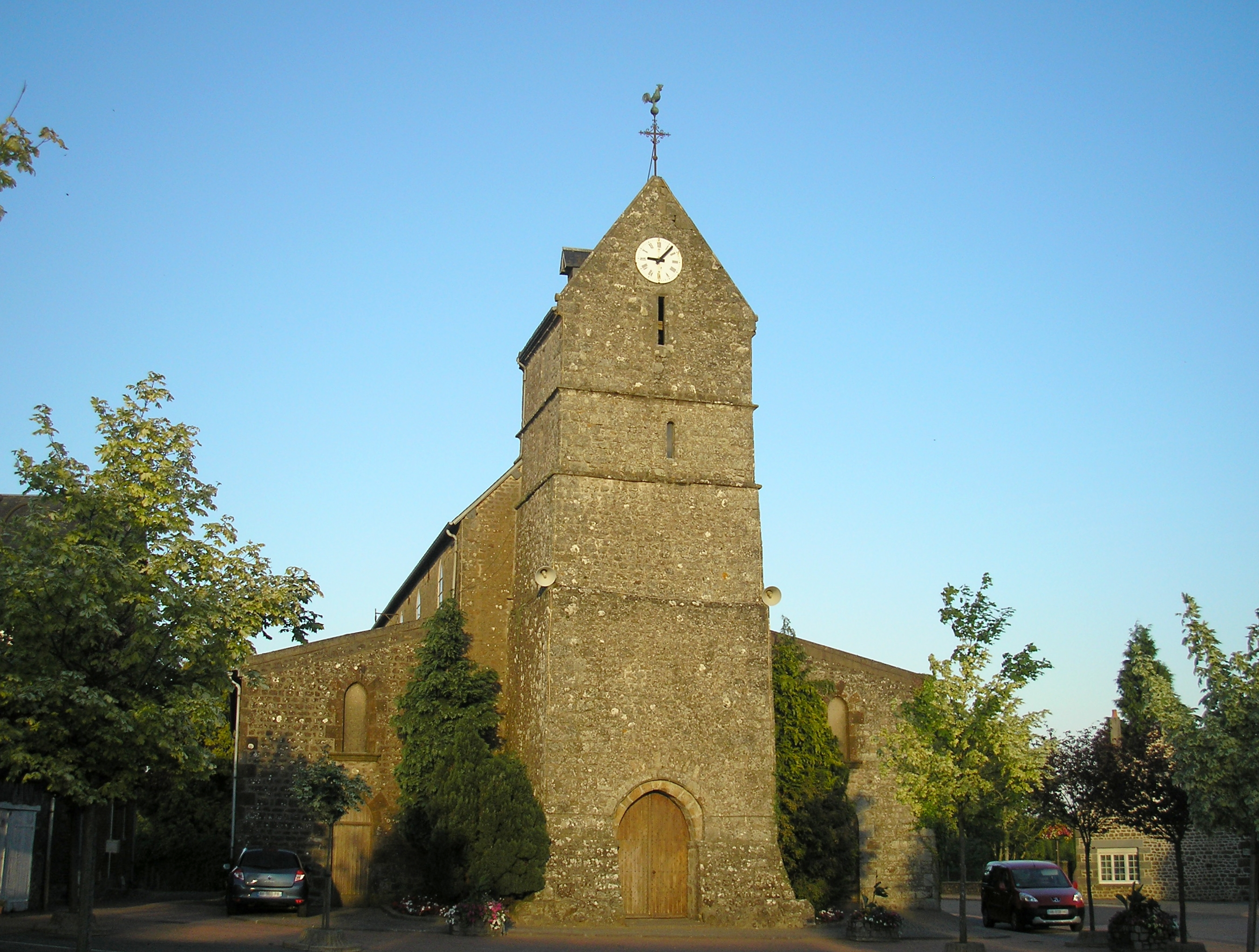 La Sauvagère (Normandie, France). L'église Saint-Pierre et Saint-Paul.